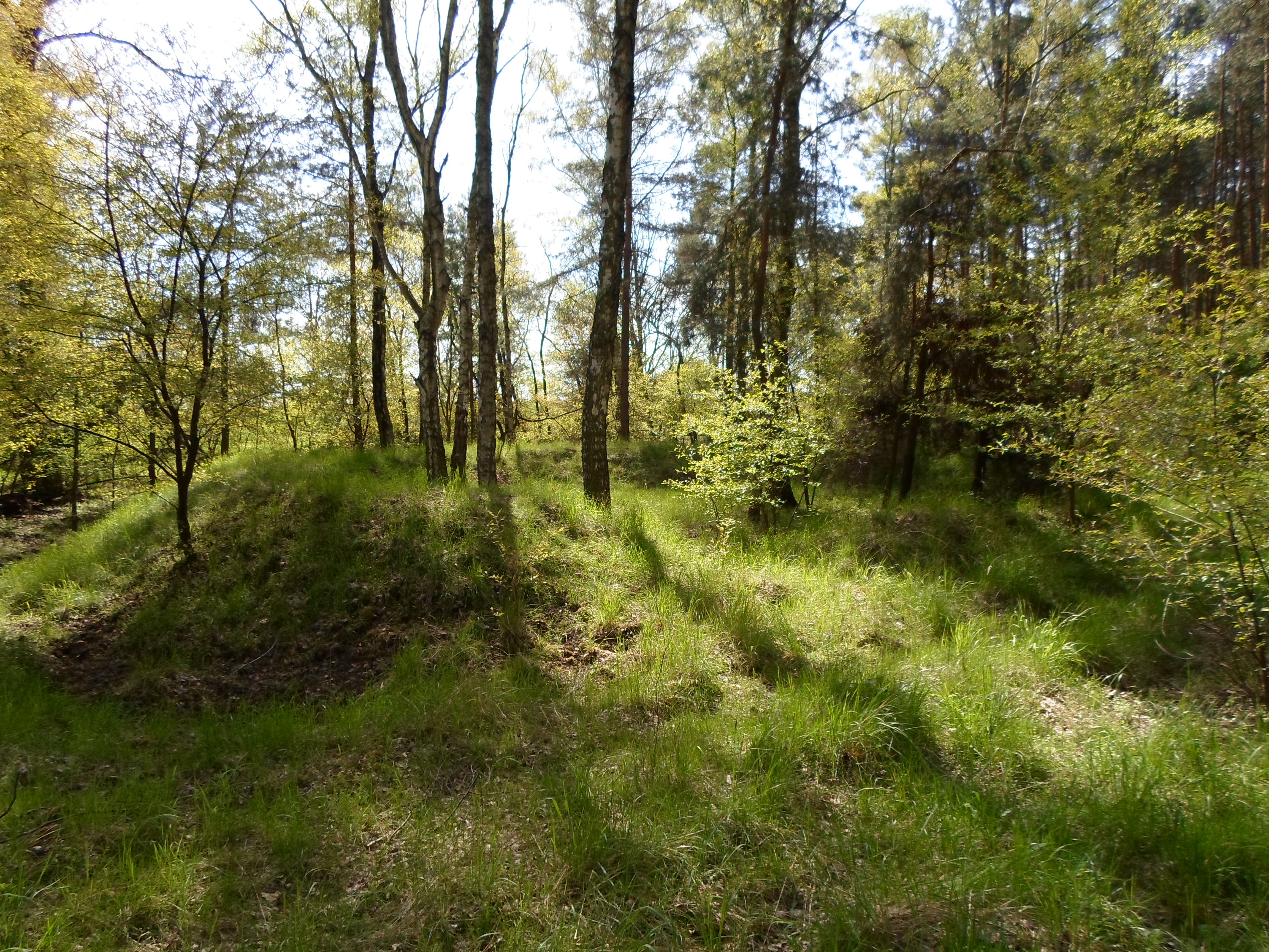 Okrągłe obwałowanie po magazynie na amunicję.